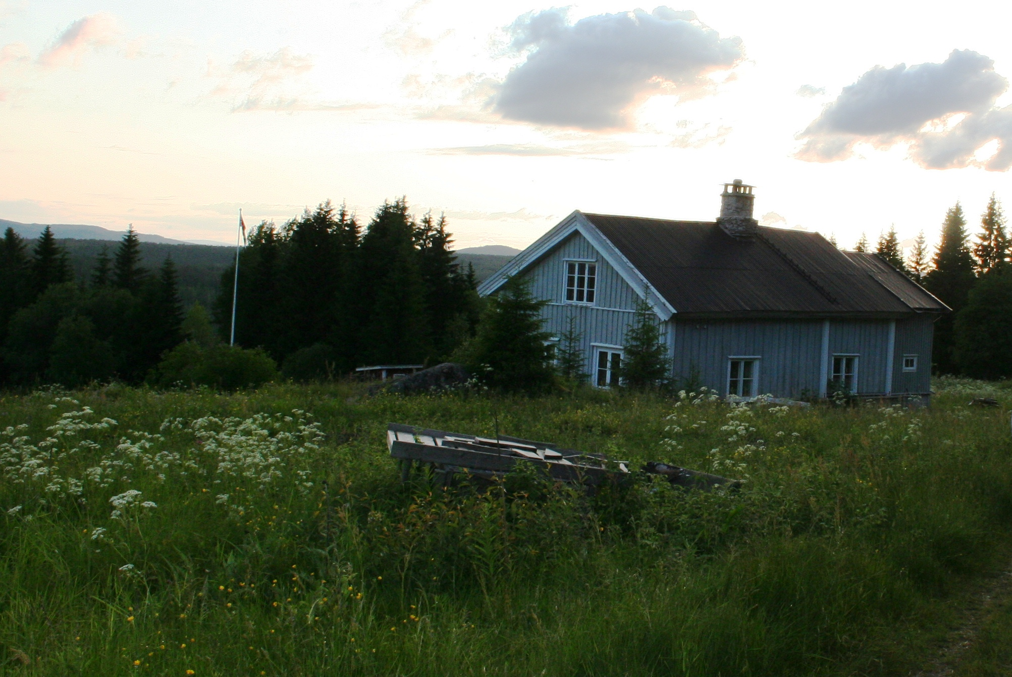 Gården Flisberget, Finnskogen, Elverum kommune, hovedhuset fra midten av 1800-tallet